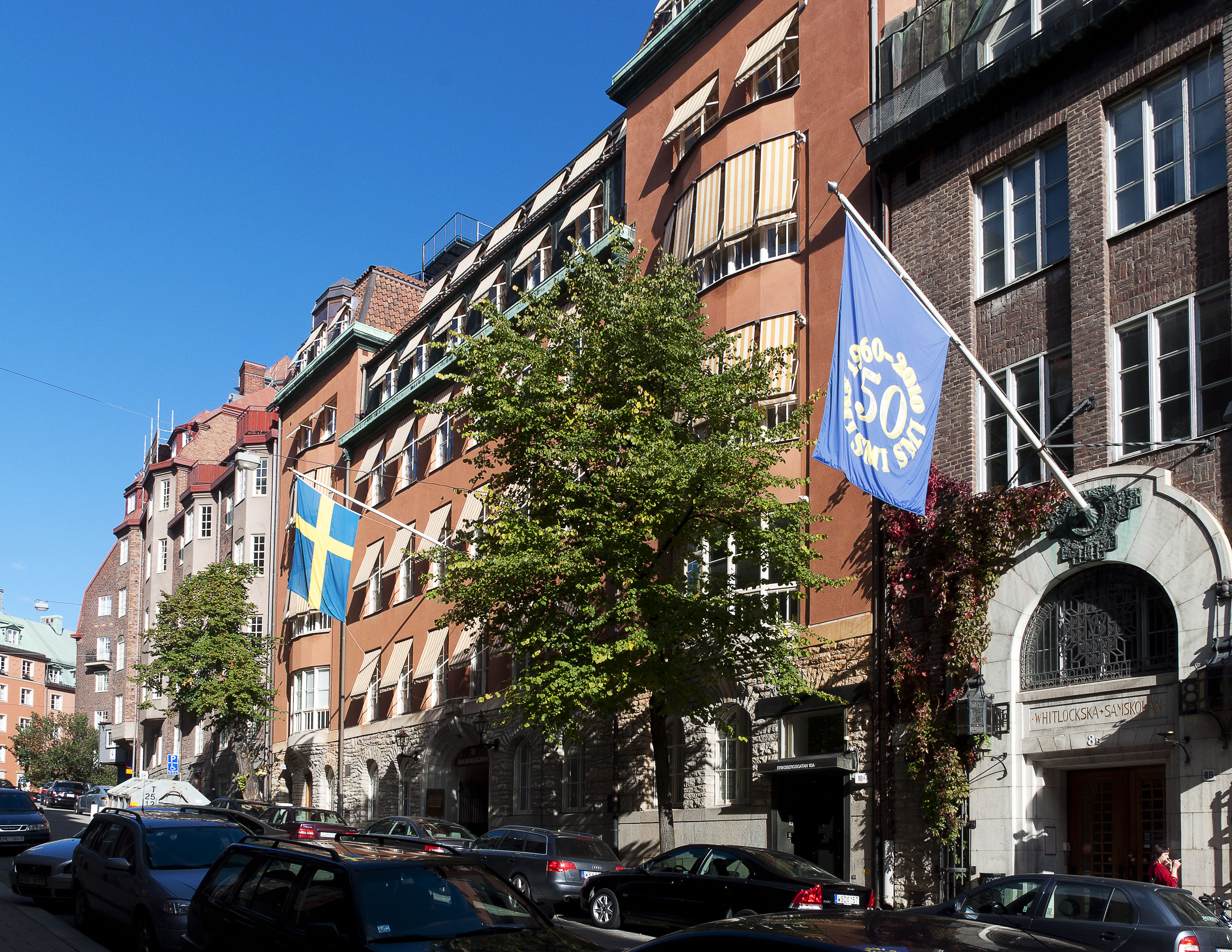 Detthowska skolan